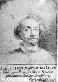 Ritratto di Agostino Mascardi, incisione, Museo Sabaudo, Torino